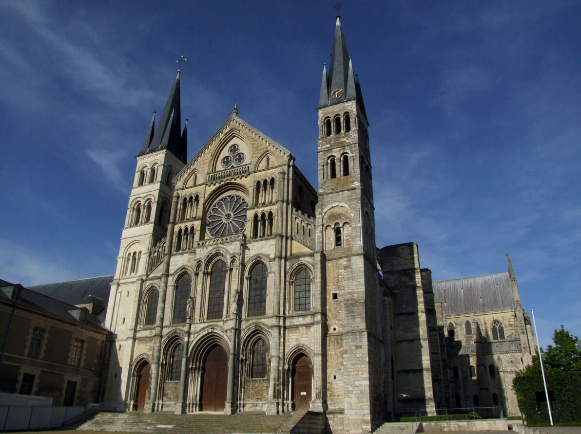 Basilique Saint-Remi (Basilica Saint Remigius), Reims, France